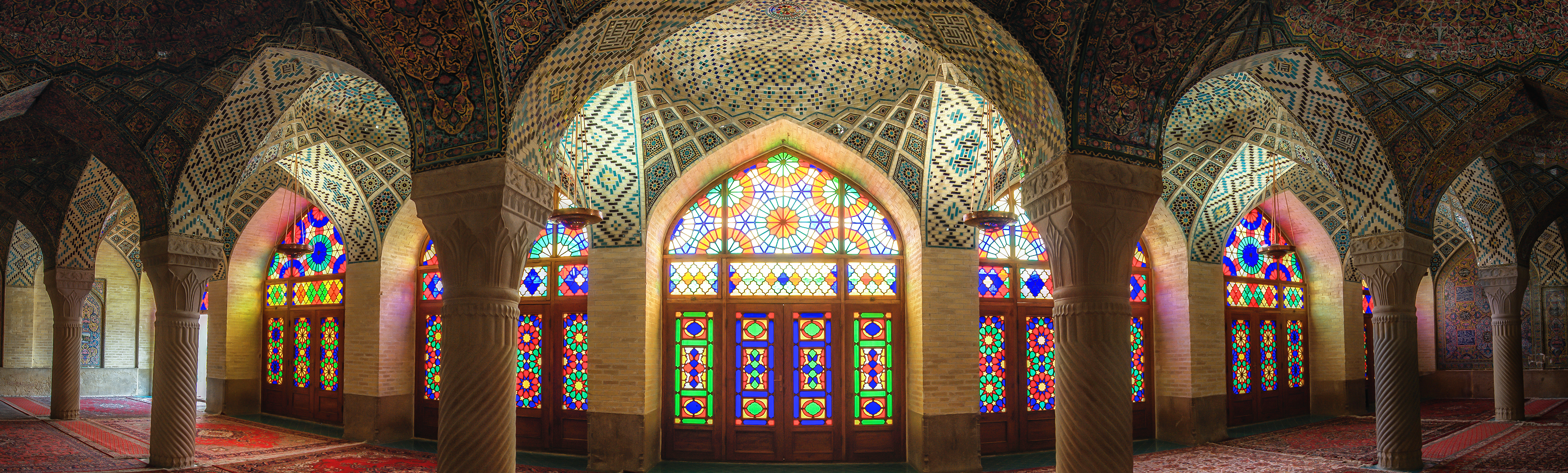 مسجد نصیر الملک